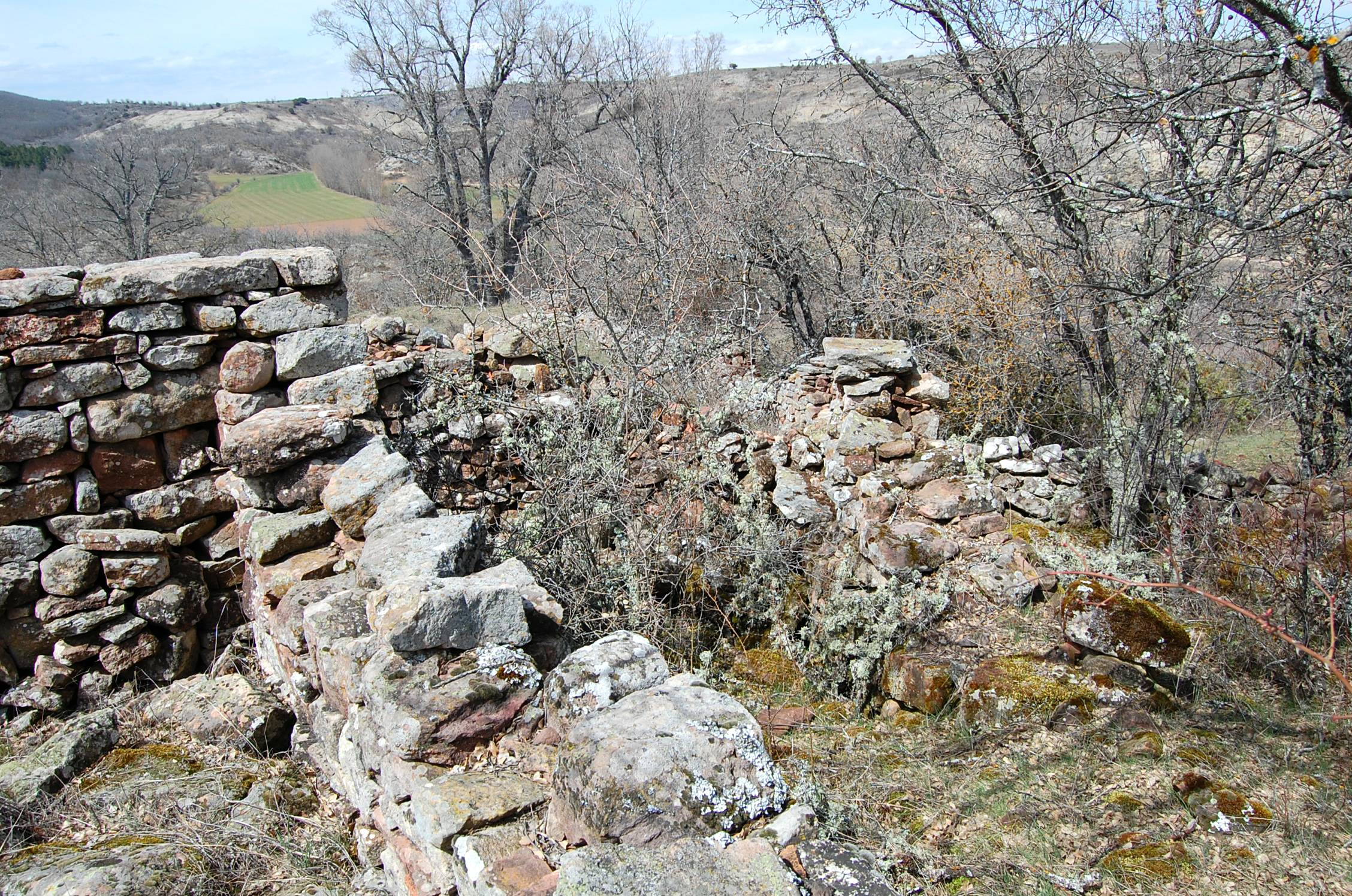 Vista de las murallas de La Cava y alrededores.